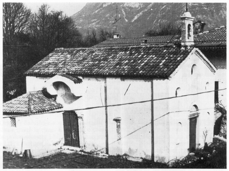 Chiesa di Ognissanti, Ospedaletto di Gemona del Friuli, prima del sisma del 1976